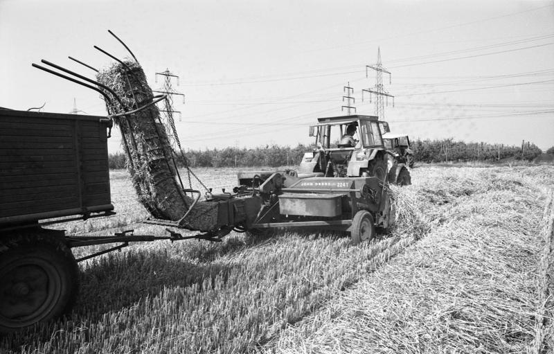 21.8.1991 Landwirtschaftlicher Betrieb bei Meckenheim, Einbringen des Strohs Information added by Wikimedia users.